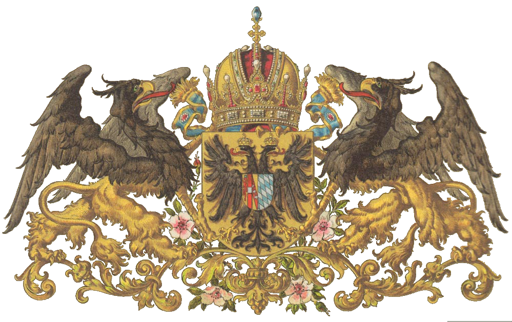 Wappen Ihrer Kaiserlich-Königlichen Majestät Elisabeth von Habsburg Lothringen geb. Wittelsbach; Kaiserin von Österreich und Königin von Ungarn etc. etc.